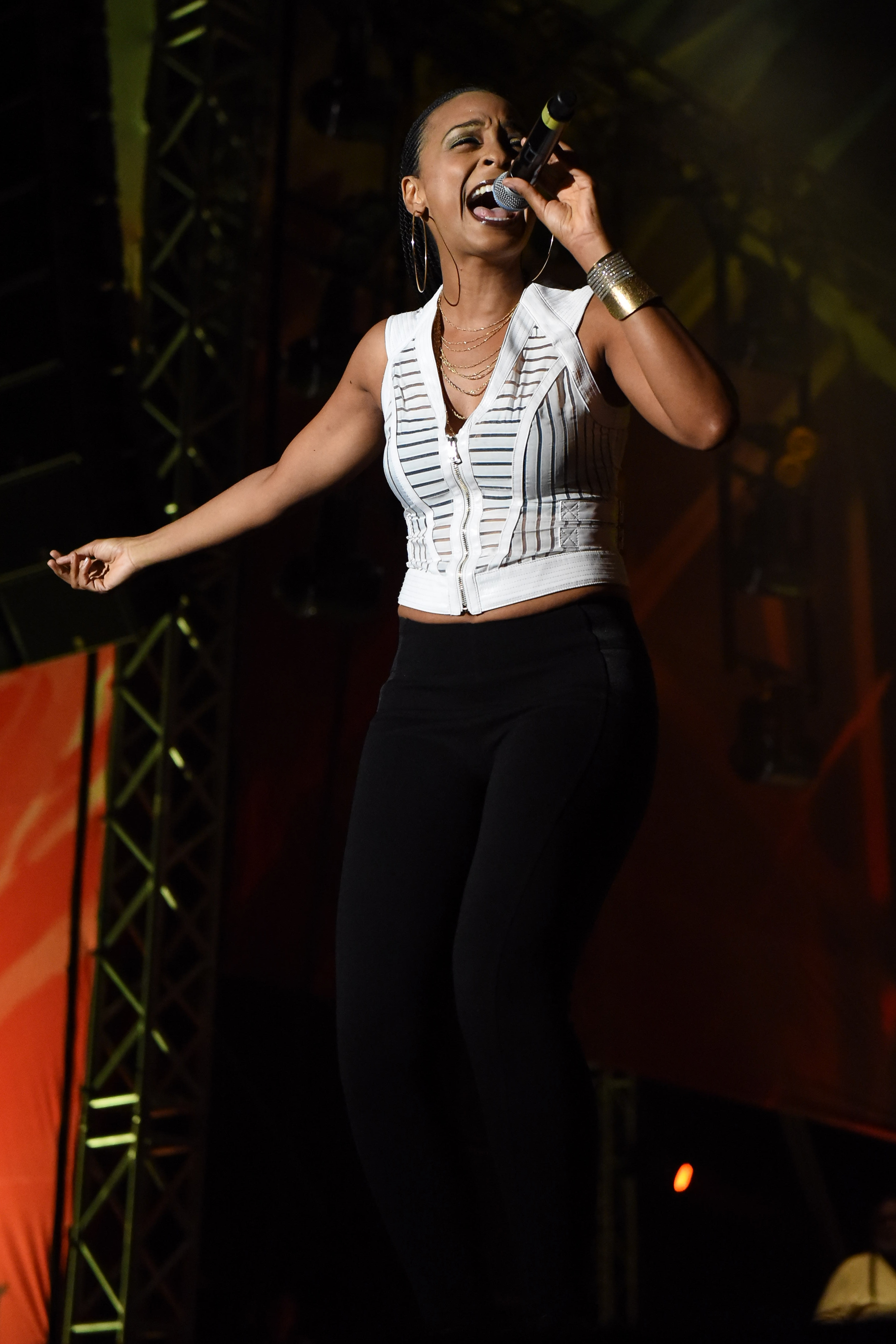 Alaine Laughton beim Ruhr Reggae Summer in Mülheim